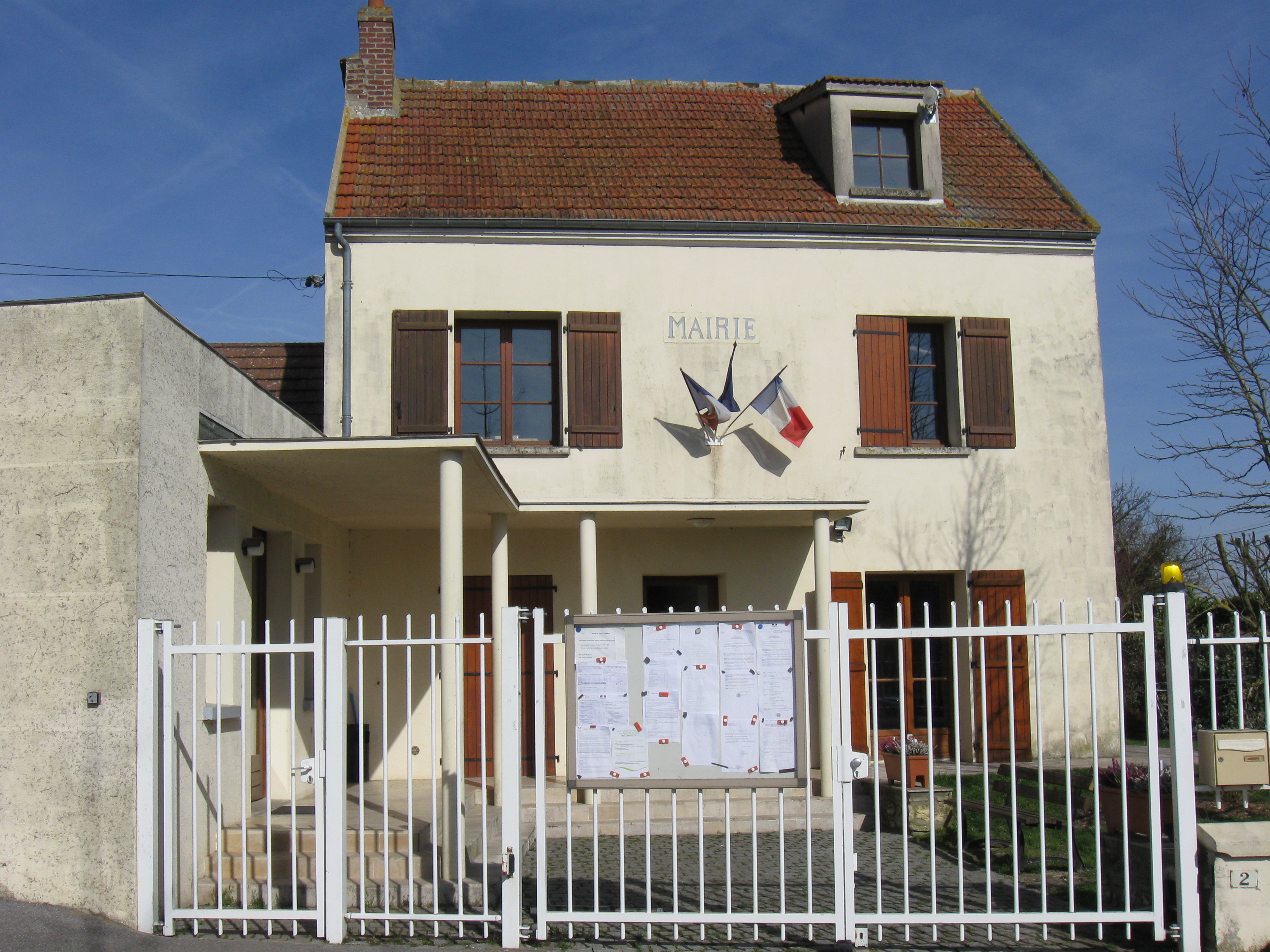 Mairie de Douy-la-Ramée. (Seine et Marne, région Île-de-France).